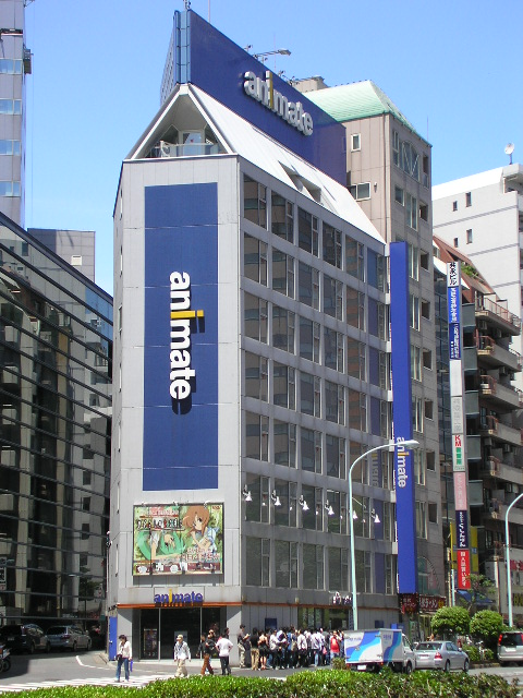 アニメイト池袋本店。壁面上のAnimeteロゴの「n」が欠落している。